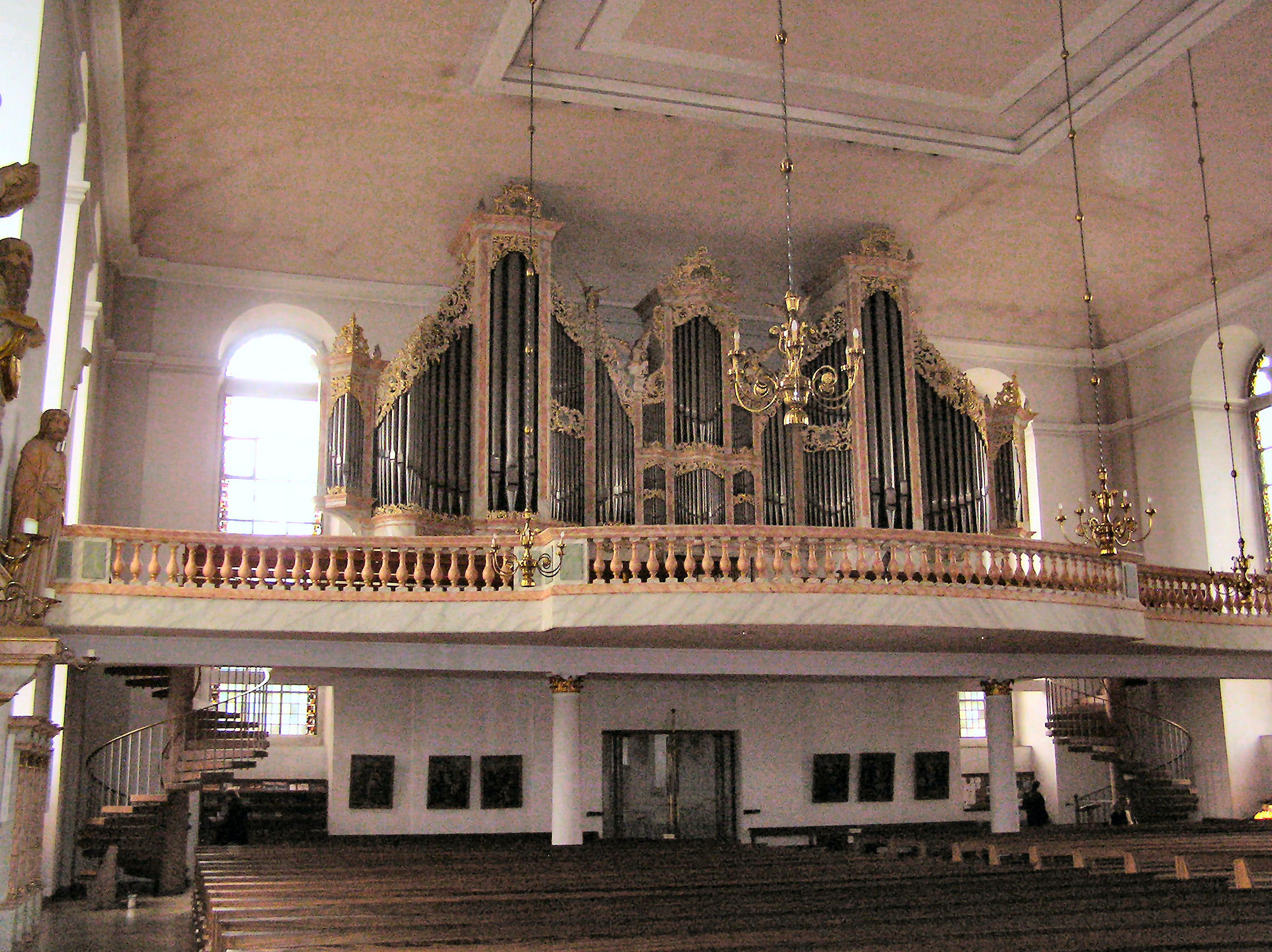 Pfarrkirche St. Vitus in Löningen